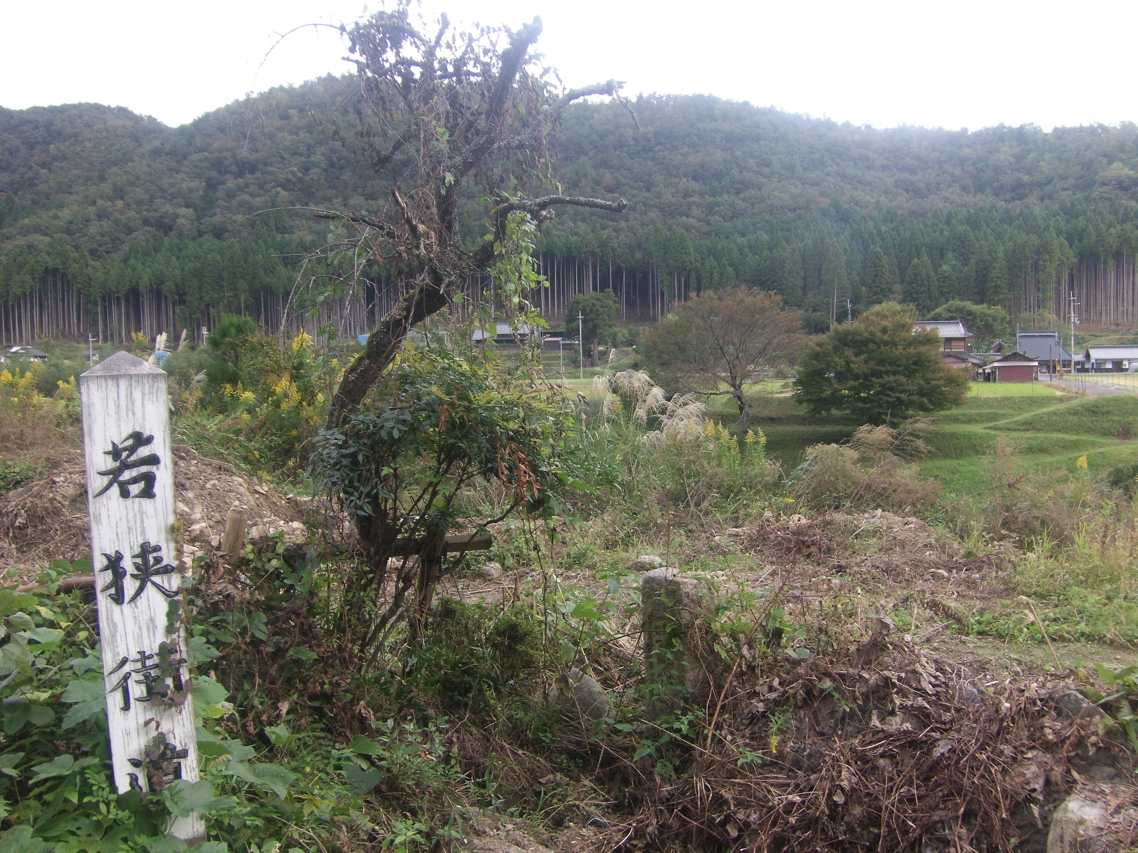 京都府南丹市を通過する若狭街道（鯖街道）を示す道標